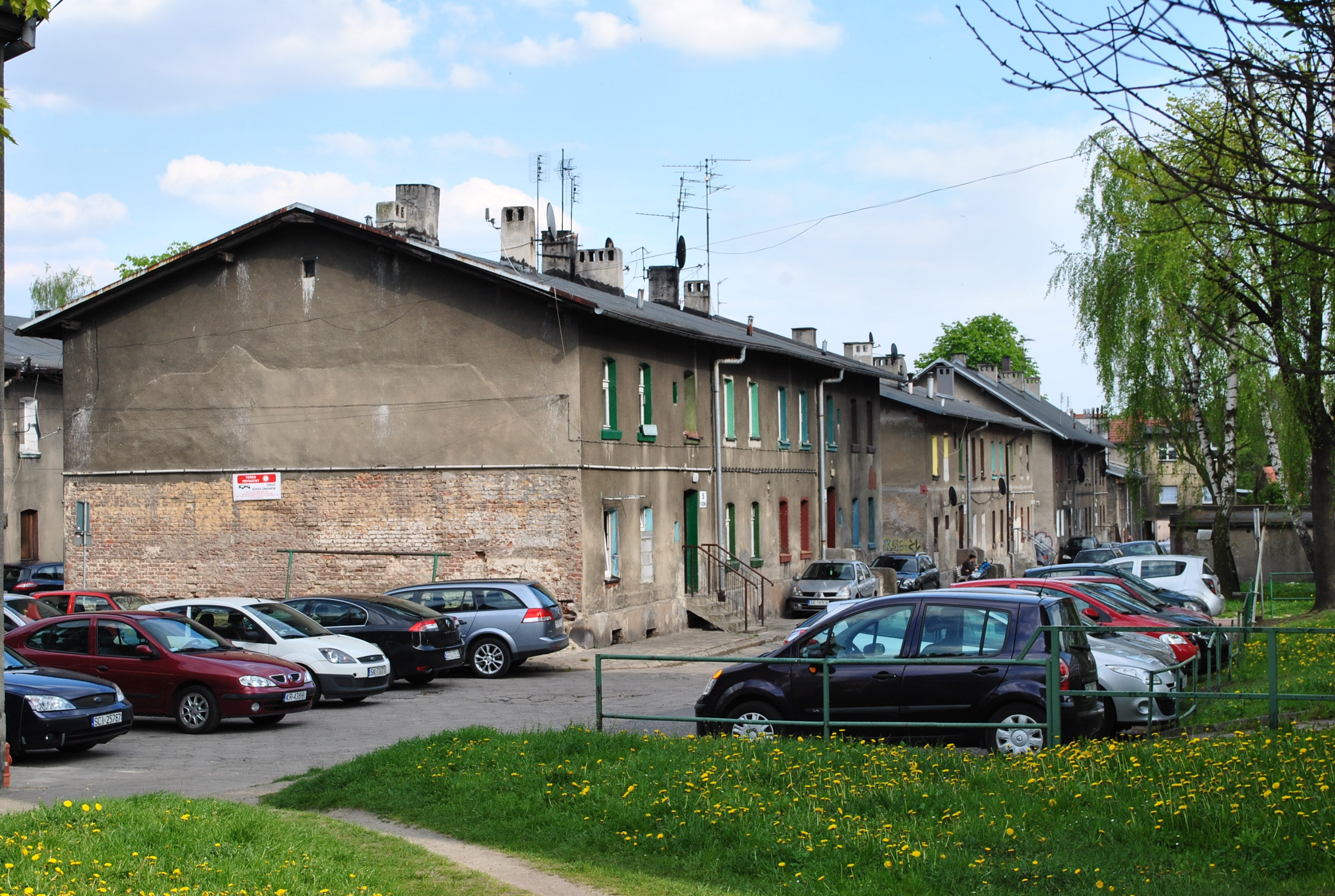 Katowice, Dąb. Ulica Studzienna